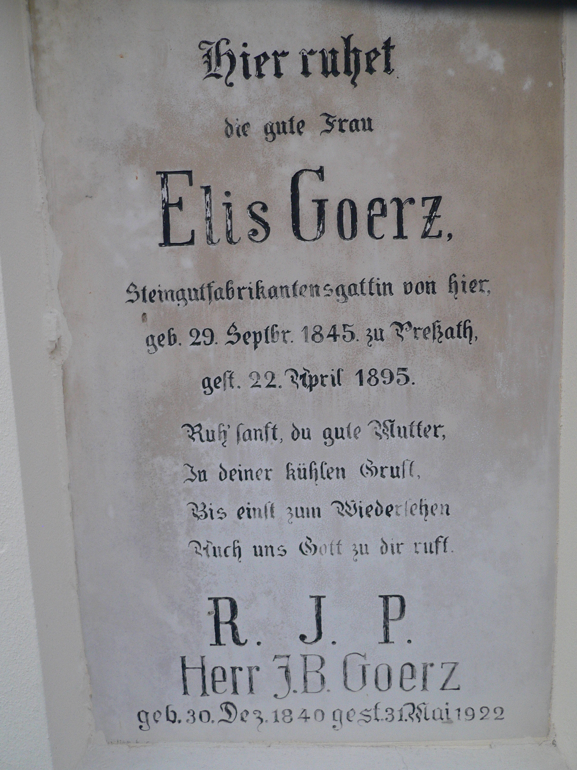 Inschrift in der Kirchenwand